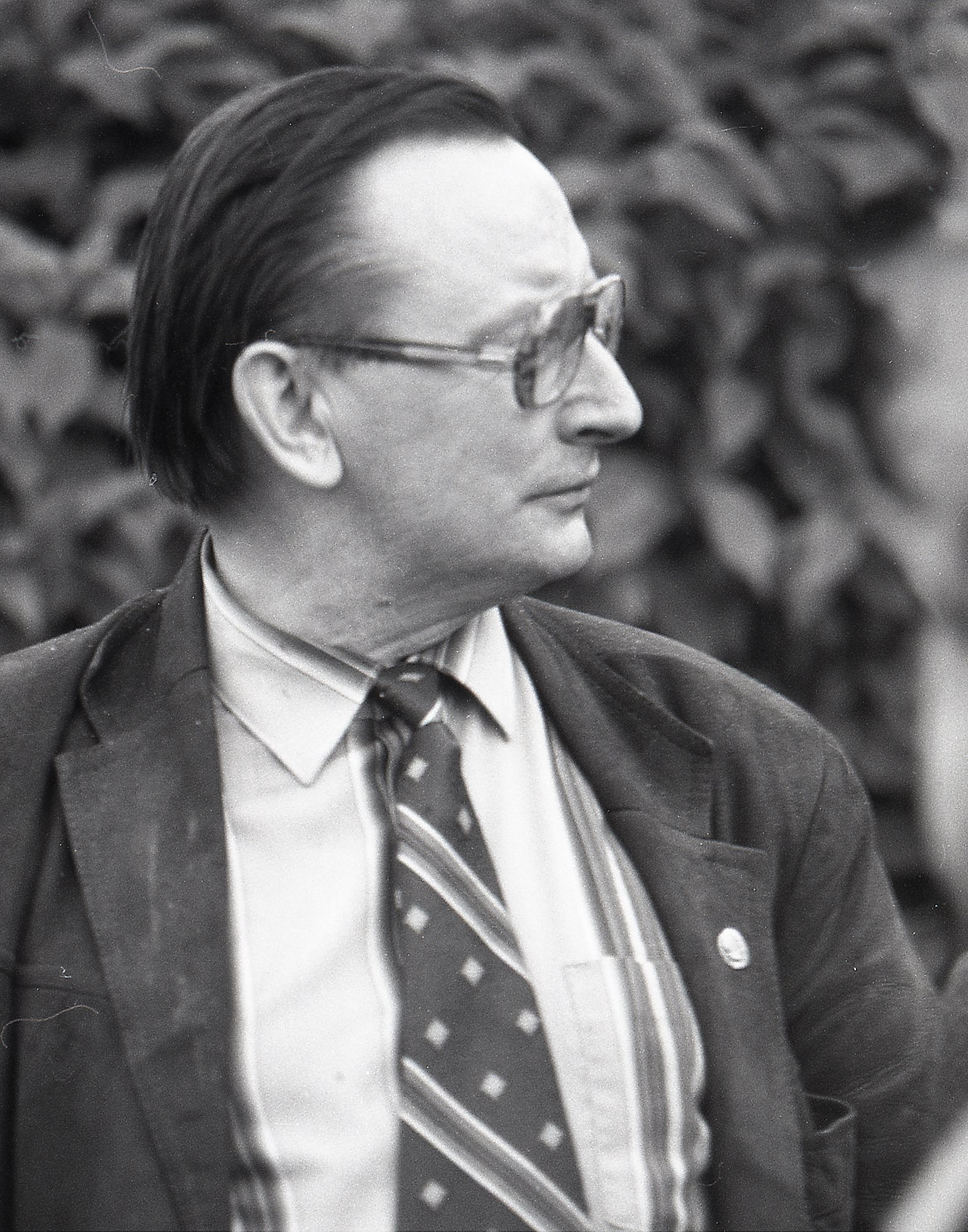 Jaan Eilart